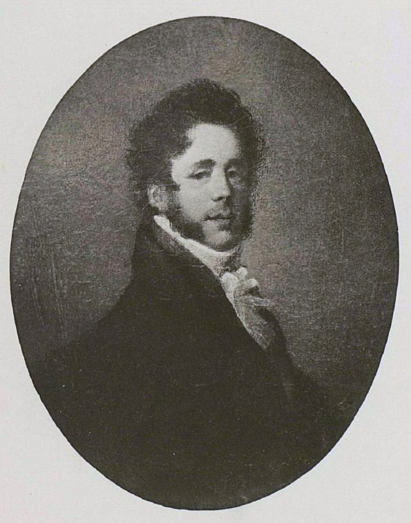 Григорий Александрович Демидов (1765-1827)